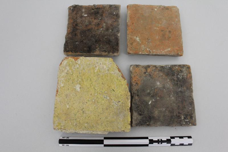 Vondst abdij van Cantimpré (Cantimpret) van Bellingen: Assortiment tegels